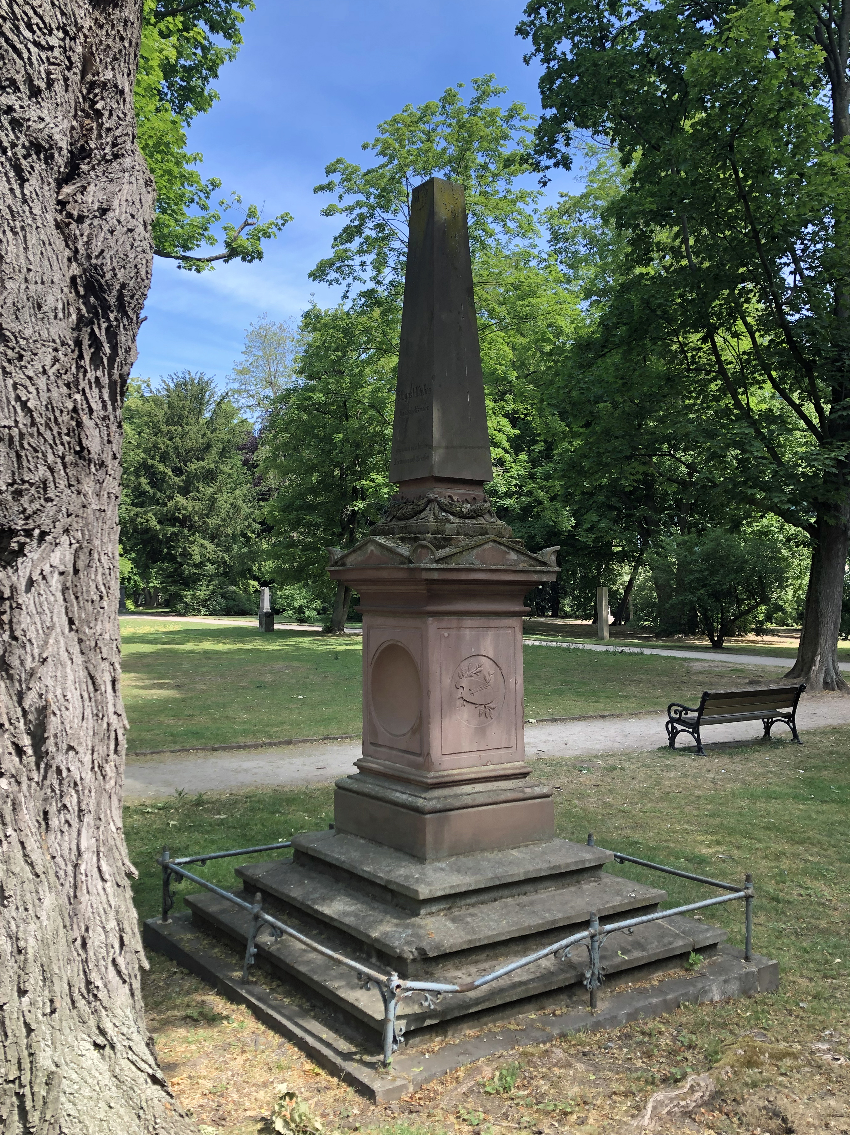 Grabmal August Weber (1817–1873), Maler, Golzheimer Friedhof Süd, Düsseldorf